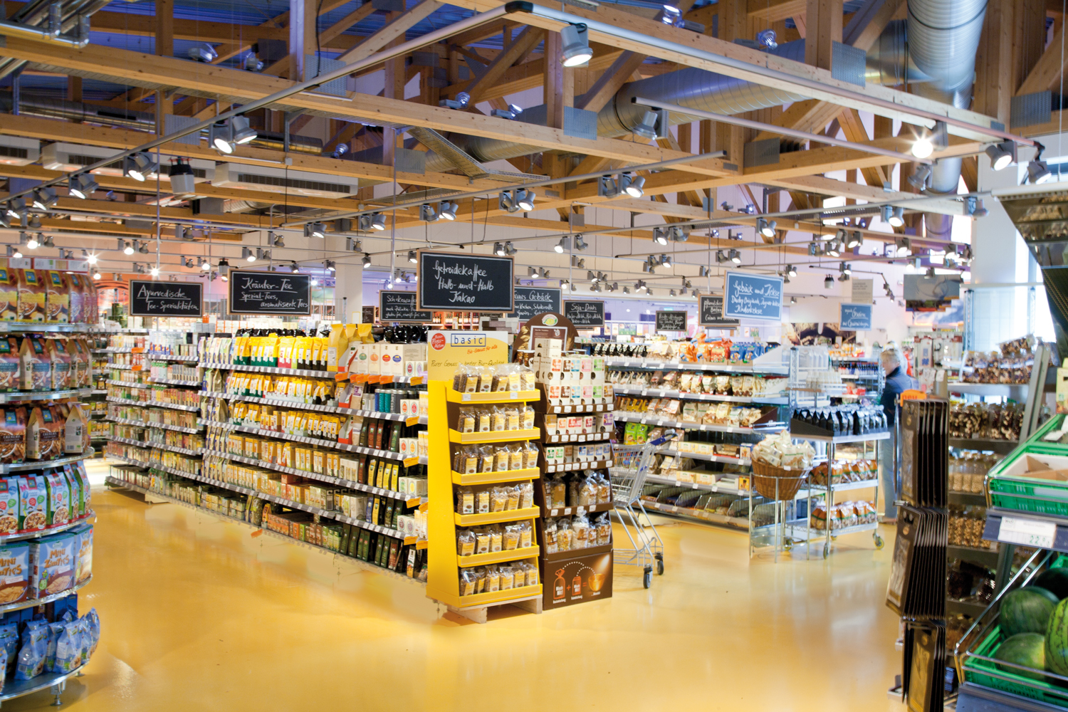 Aktuelles Erscheinungsbild einer Filiale der Basic AG